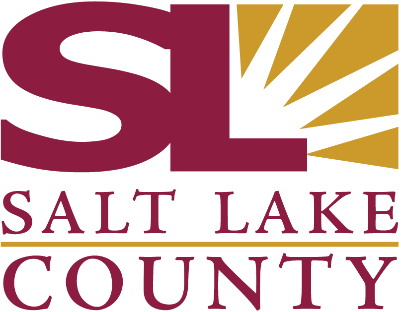 Salt Lake County logo